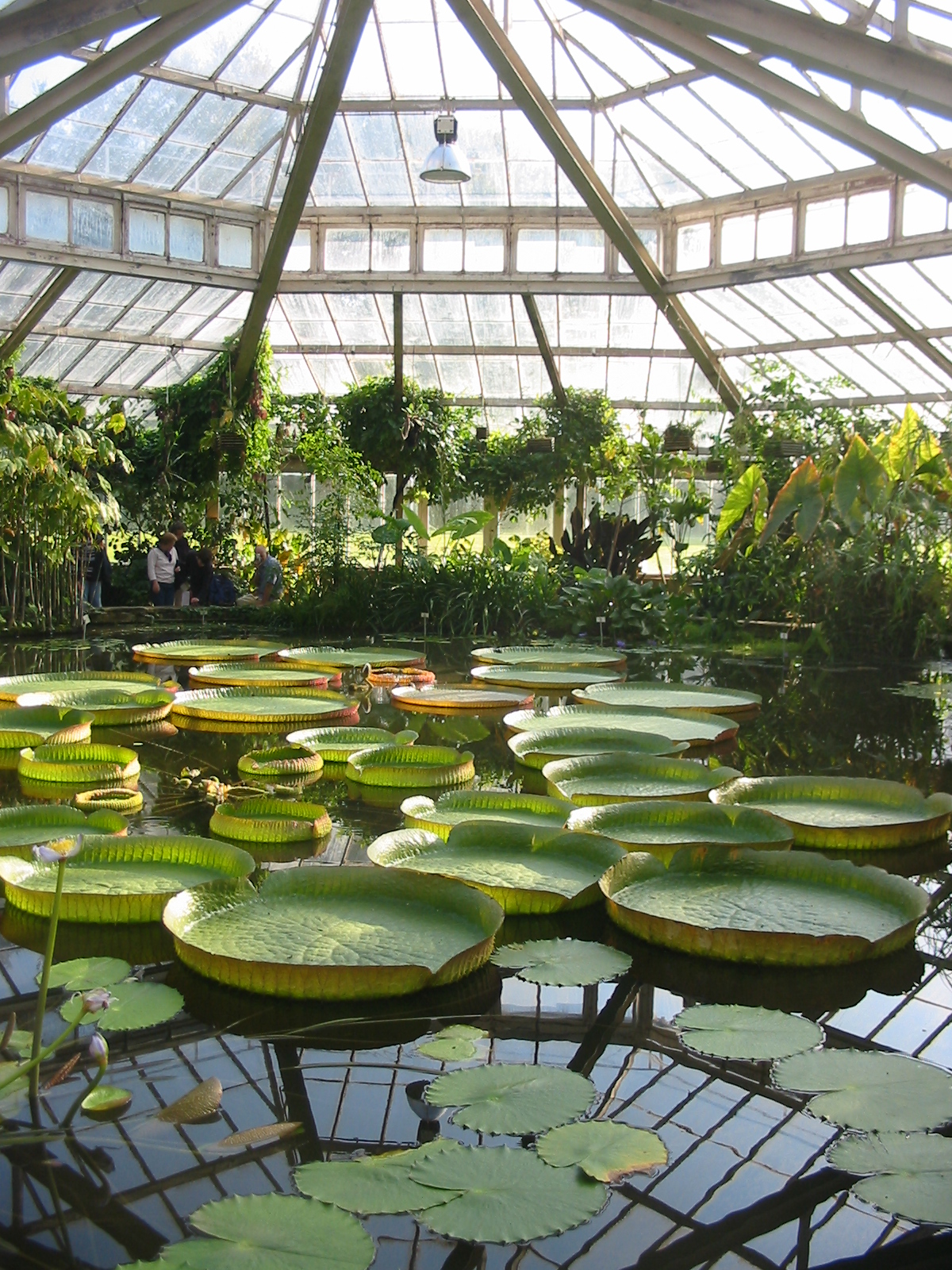 Victoria, Plantentuin, Meise, Belgium